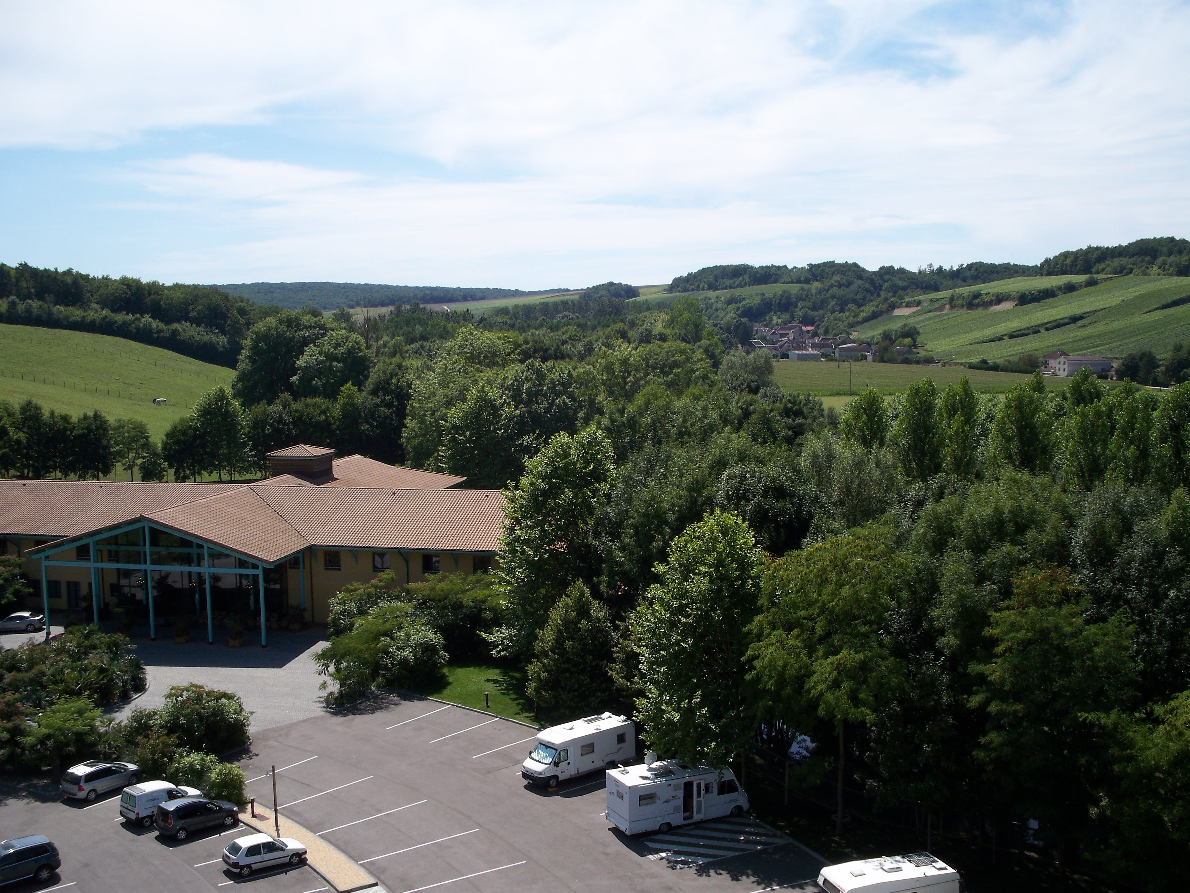 La commune de Argançon, située dans le département de l'Aube, vue depuis la Grande Roue du parc d'attractions « Nigloland » de Dolancourt